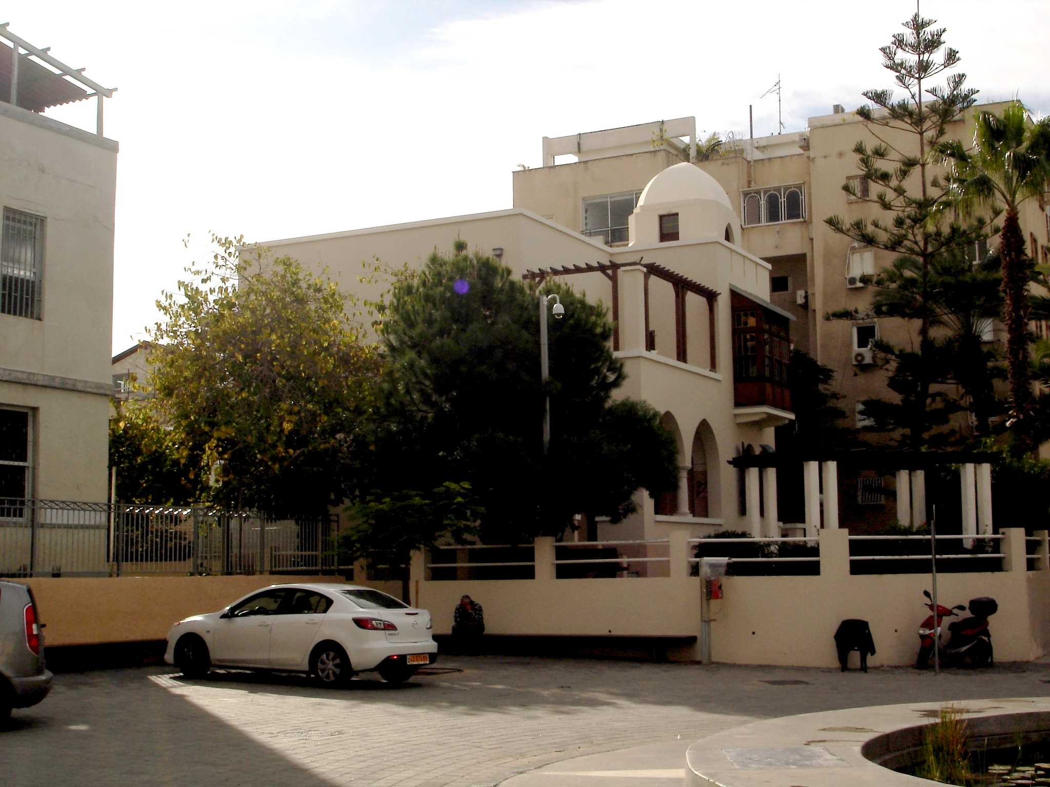 Home of H.M Bialik; Bialik street, Tel Aviv, Israel